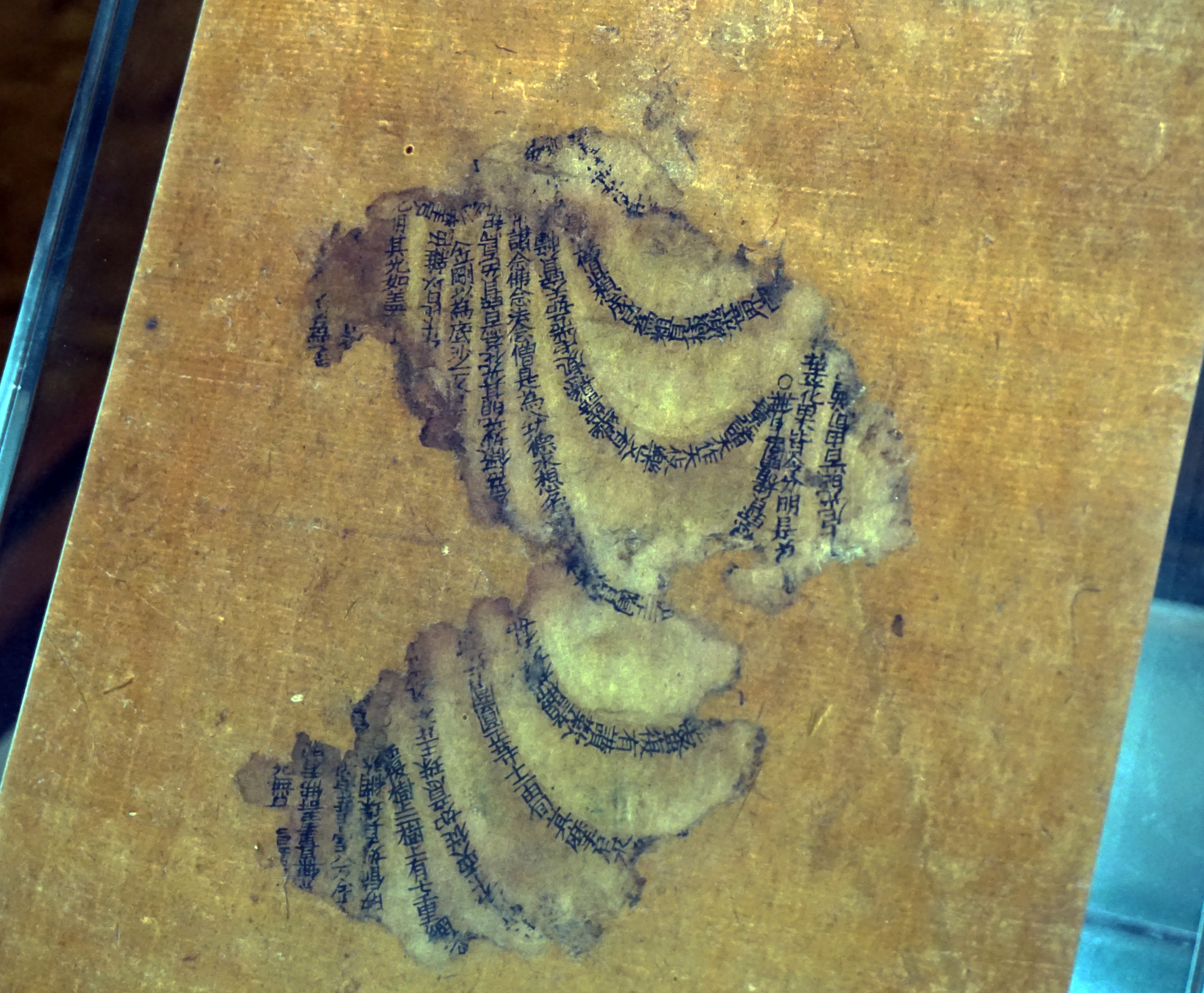 活字《佛说观无量寿佛经》残叶，温州白象塔出土，温州博物馆藏。被认为是现存最早的活字印刷品。